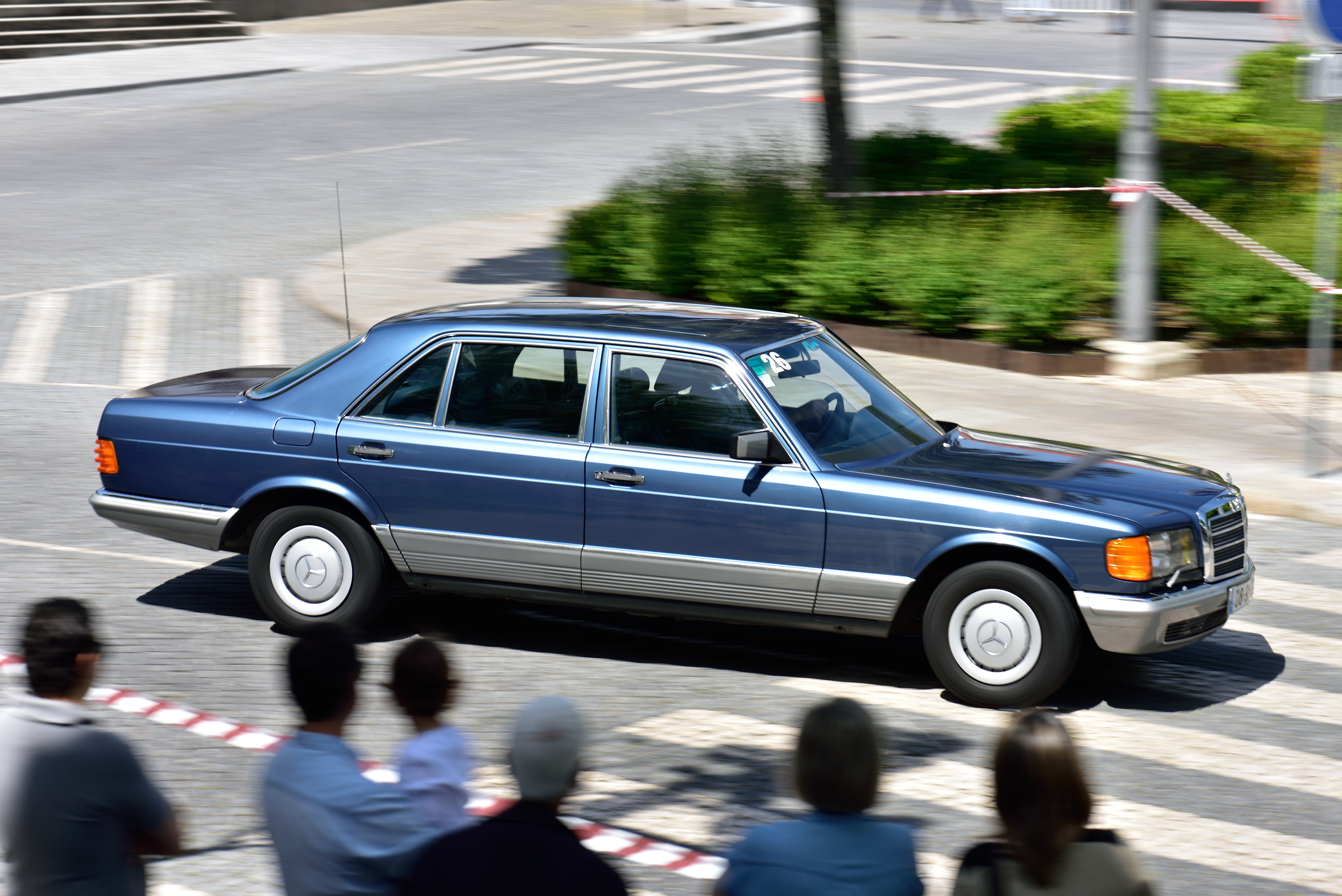 Castelo Branco Classic Auto - 10MAI02015